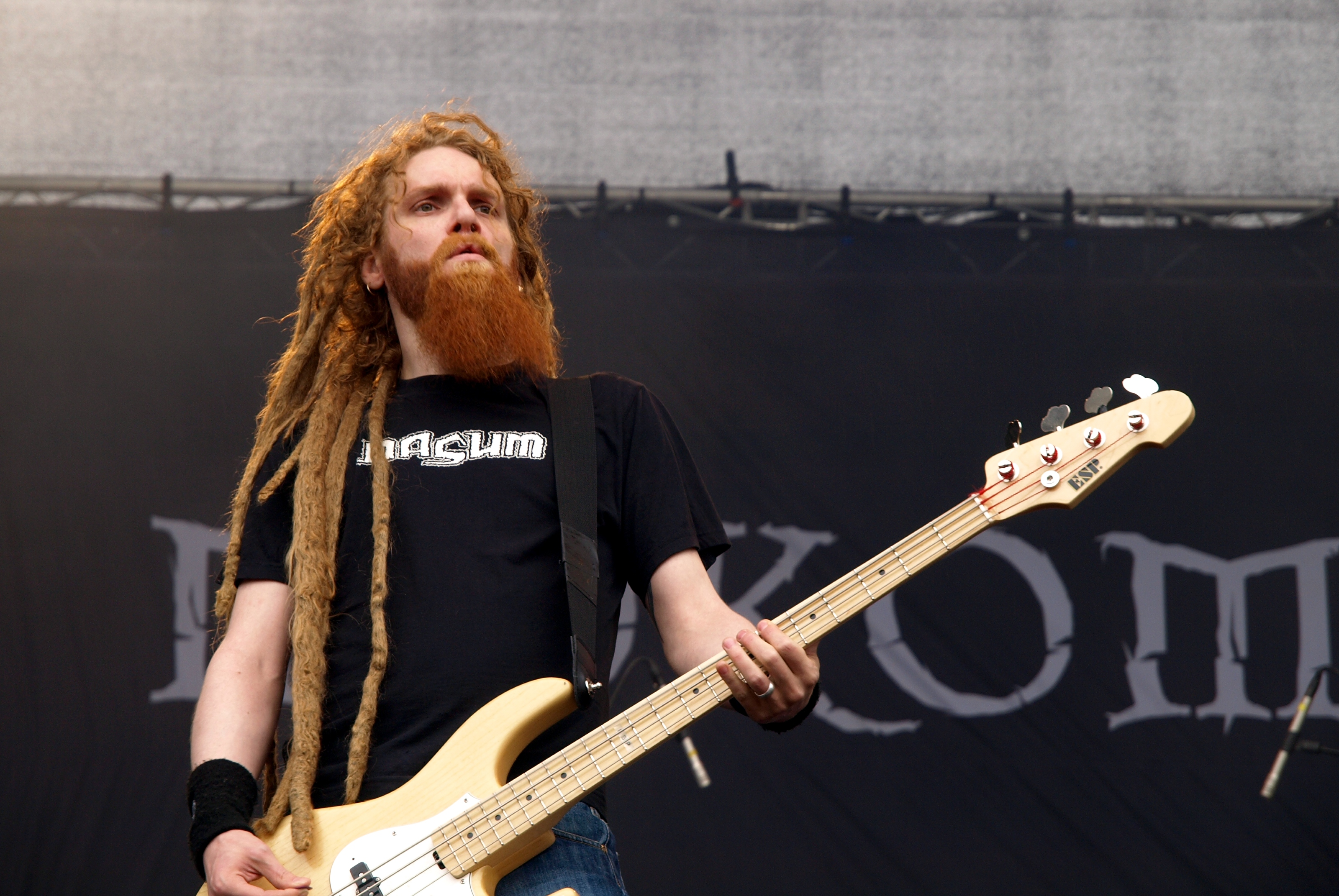 Mokoma live am Myötätuulirock 2011